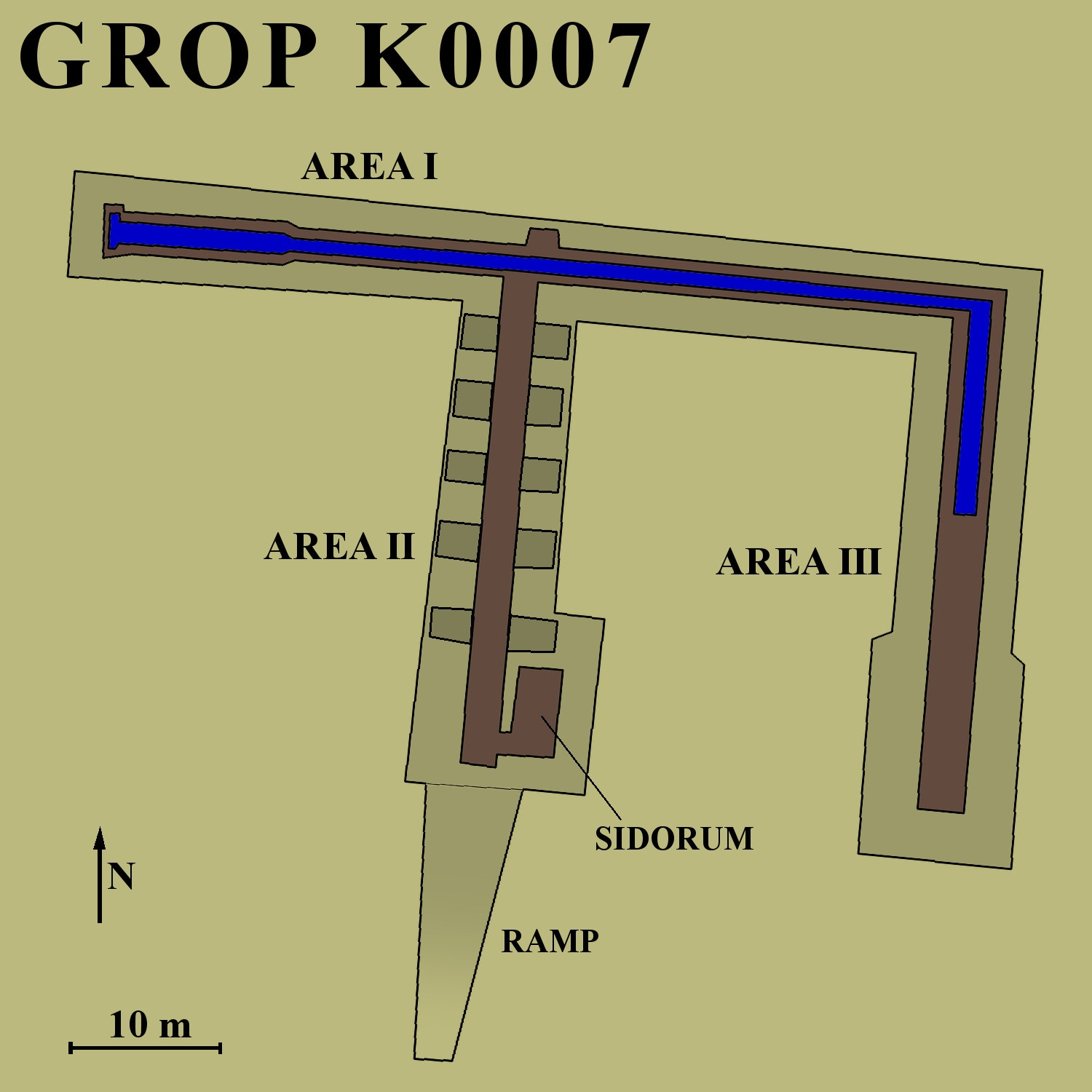 Layout över Grop K0007